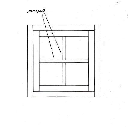 Prosspulga võimalik asukoht aknaraami konstruktsioonis